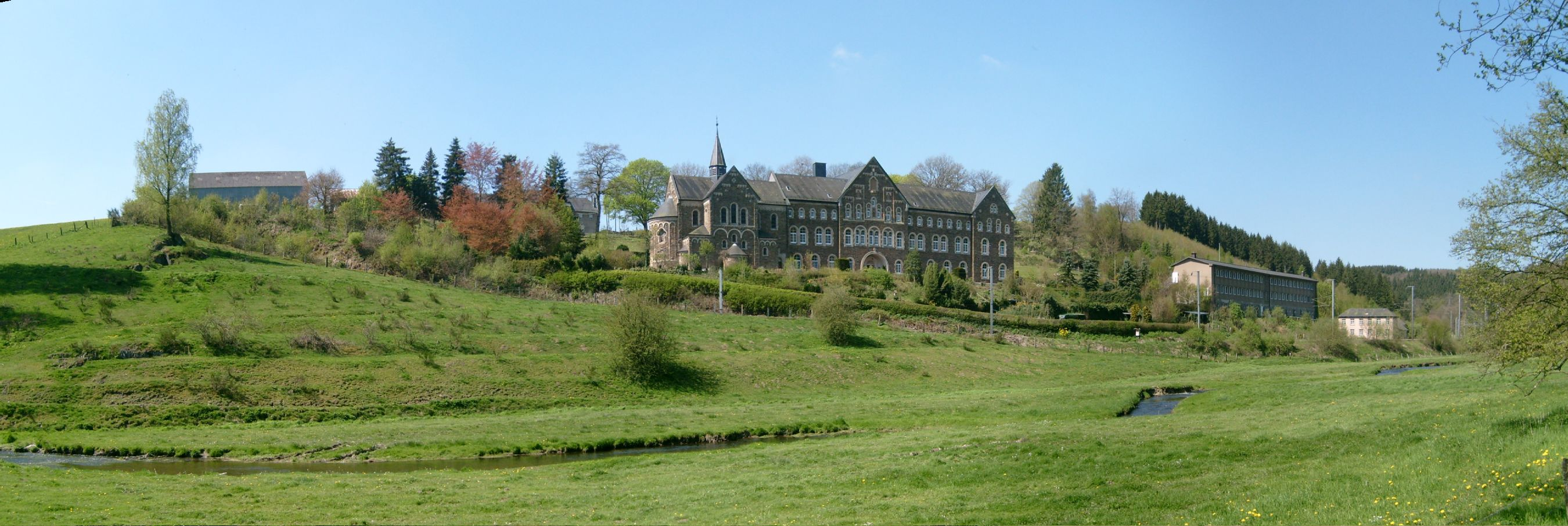 D'Pafemillen.